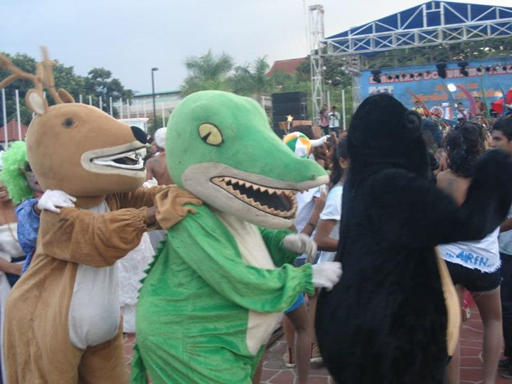 Carneval em Dili